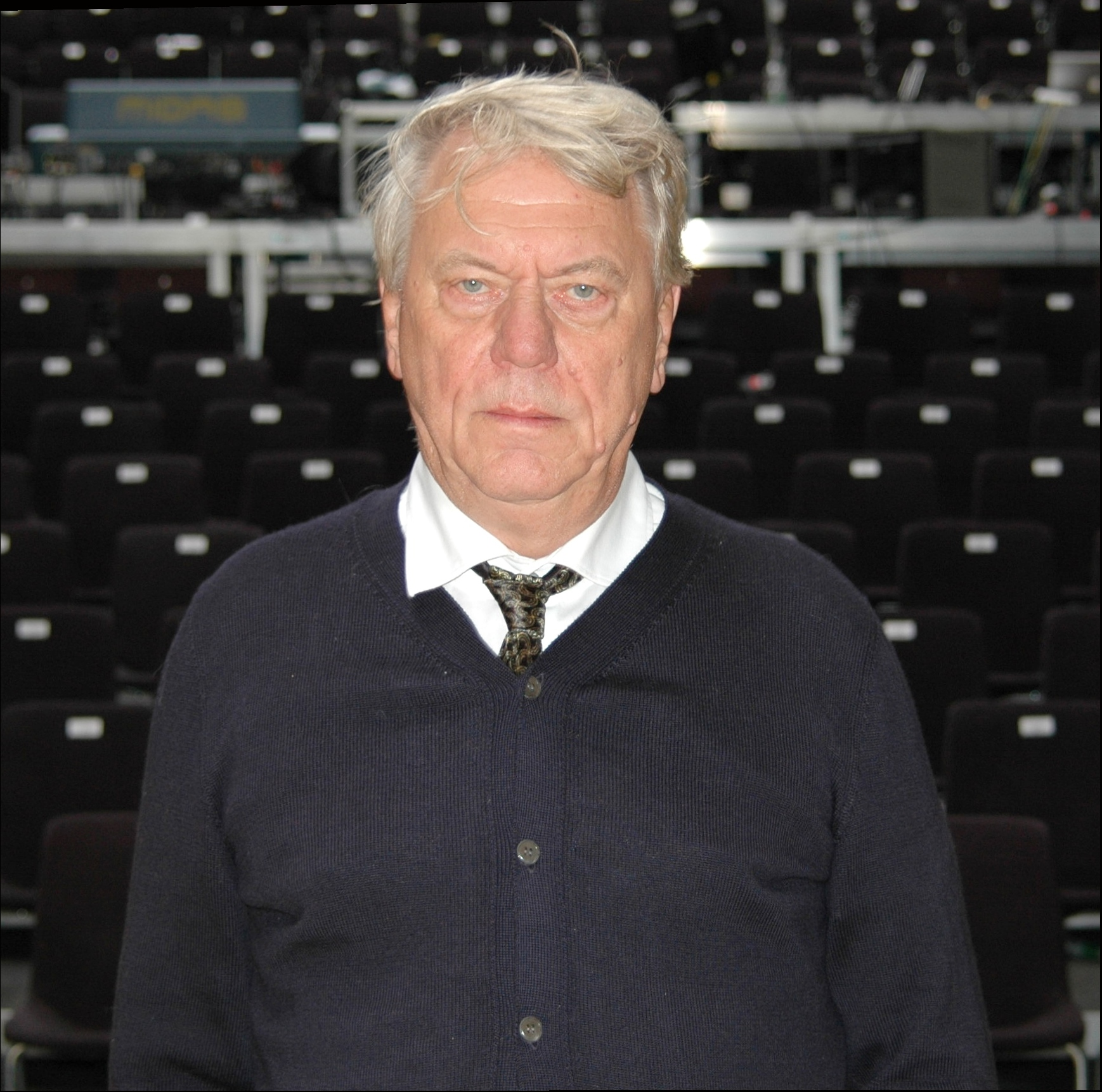 Johan Simons (2017), Künstlerischer Leiter der Ruhrtriennale